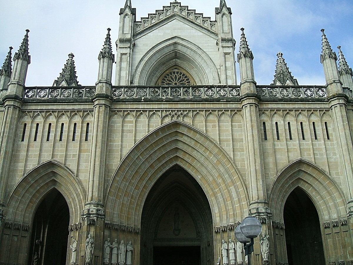 Fachada principal de la Catedral Nueva de Vitoria-Gasteiz